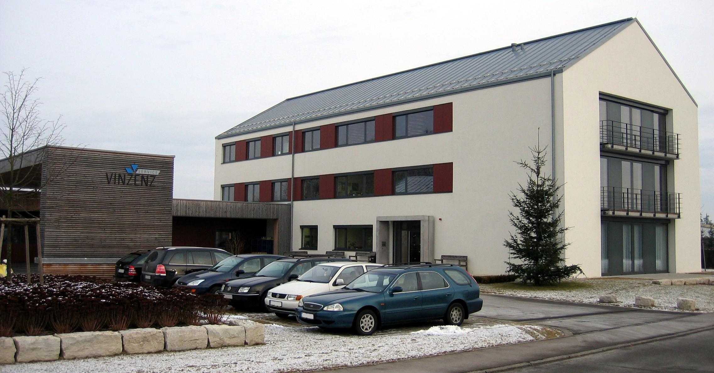 Vinzenz Service GmbH in Sigmaringen (Matthäus-Hanh-Straße) der Genossenschaft der Barmherzigen Schwestern vom hl. Vinzenz von Paul in Untermarchtal e.V. des Ordens der Barmherzigen Schwestern vom hl. Vinzenz von Paul